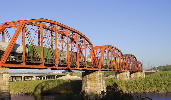 Puente del Ferrocarril de Piedras Negras, Coah.